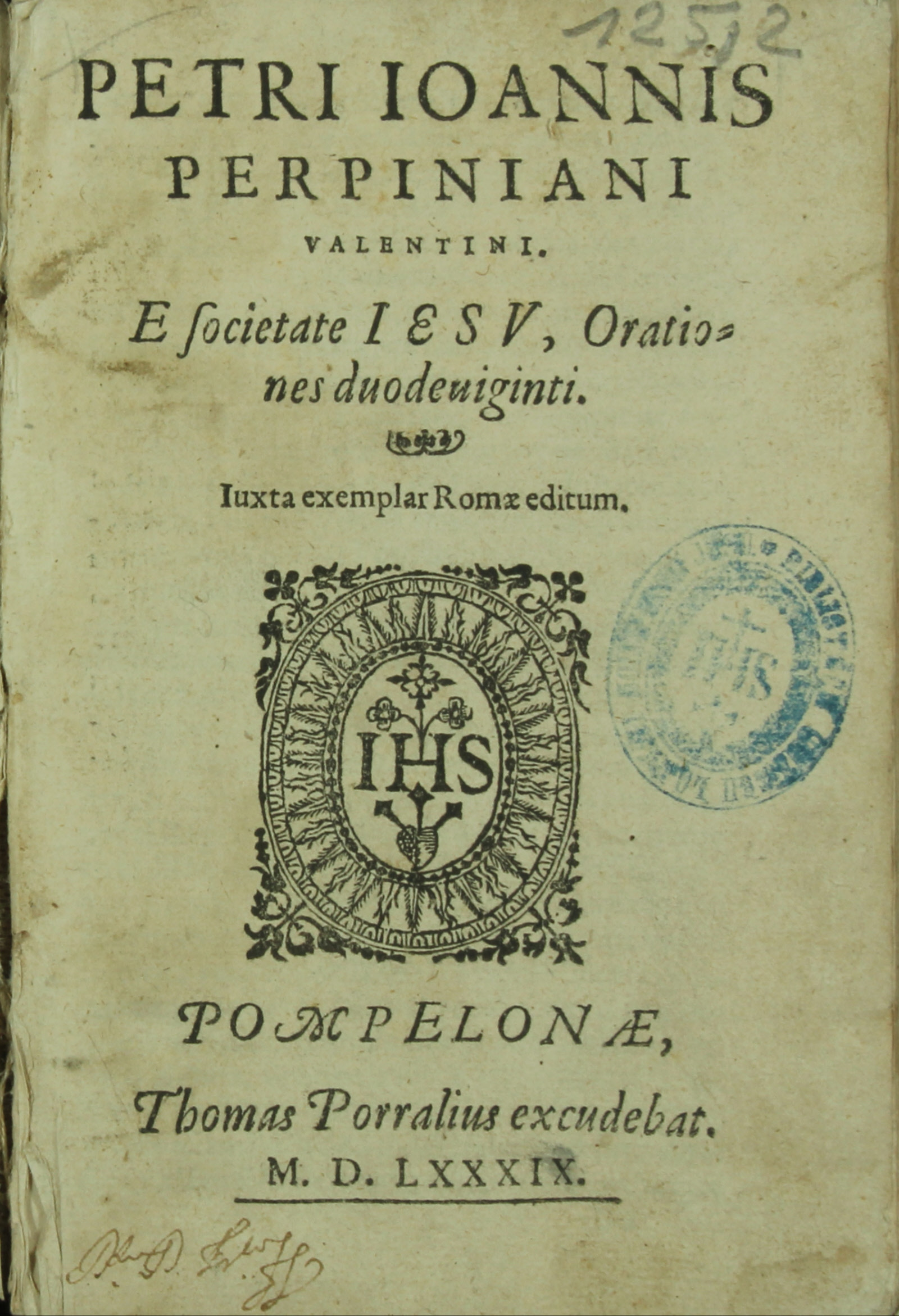 Coberta de Orationes duodeviginti, de Pere Joan Perpinyà (Pamplona, 1589).